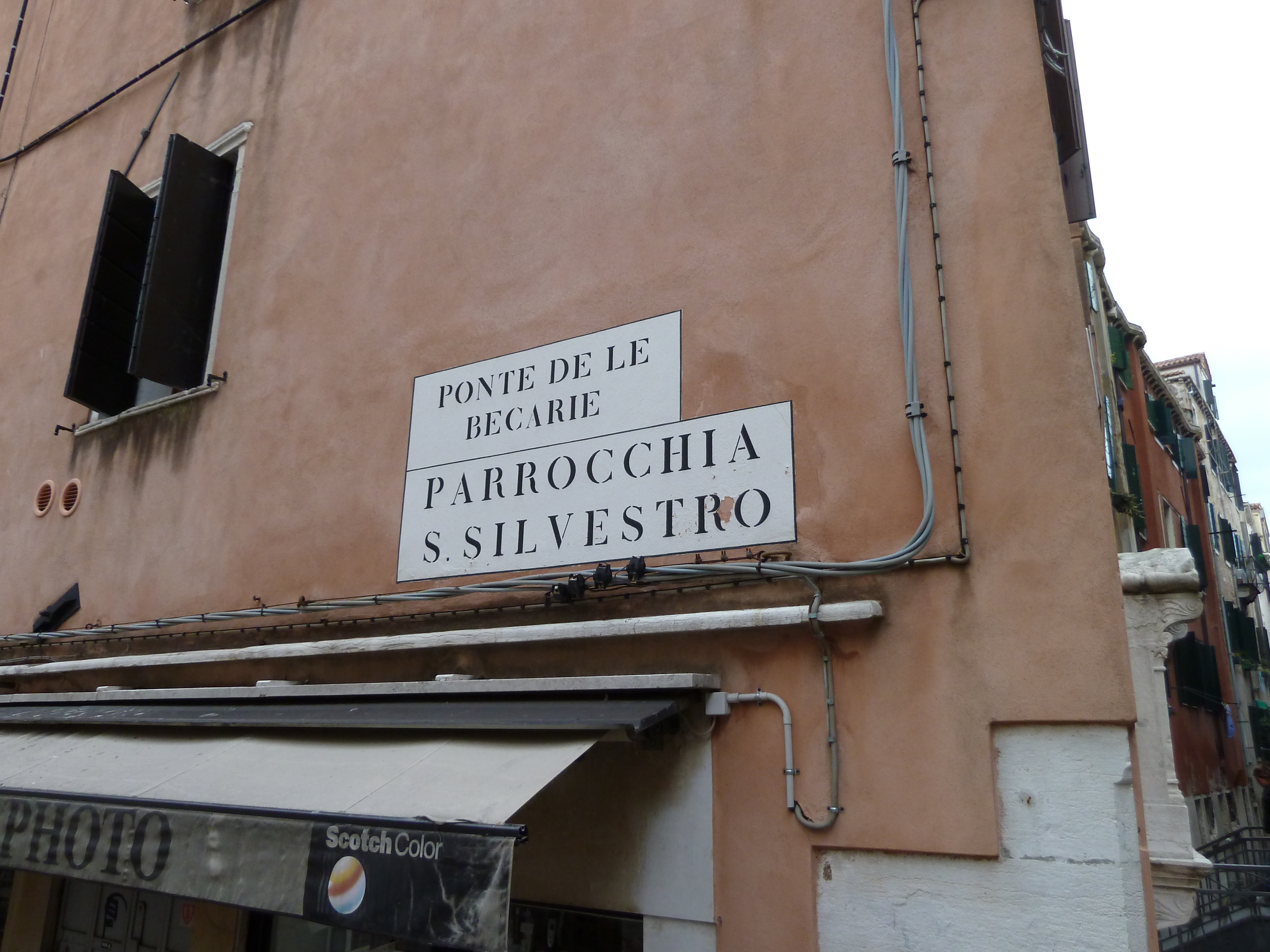 pte becarie